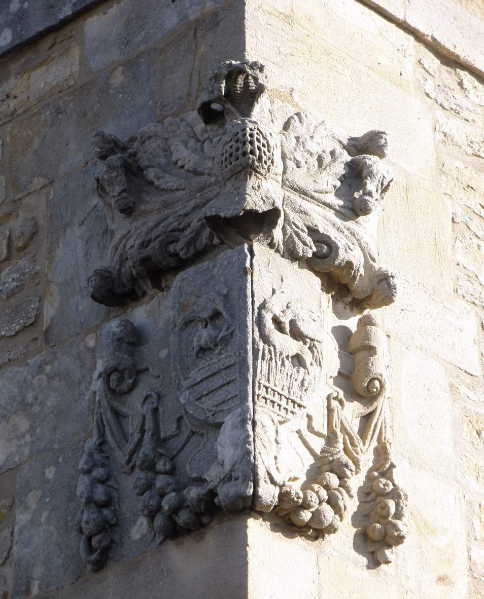 Ilarratza (Álava)